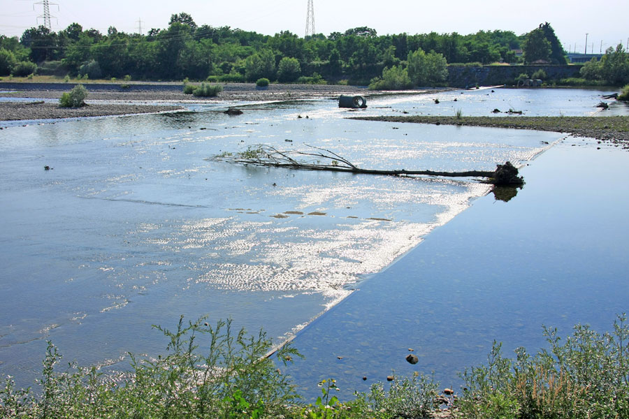 Il passaggio del Canale Cavour sotto al fiume Sesia tra Recetto (NO) e Greggio (VC)